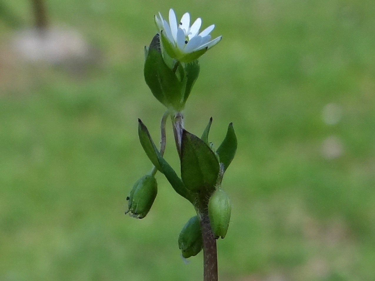 Stellaria media